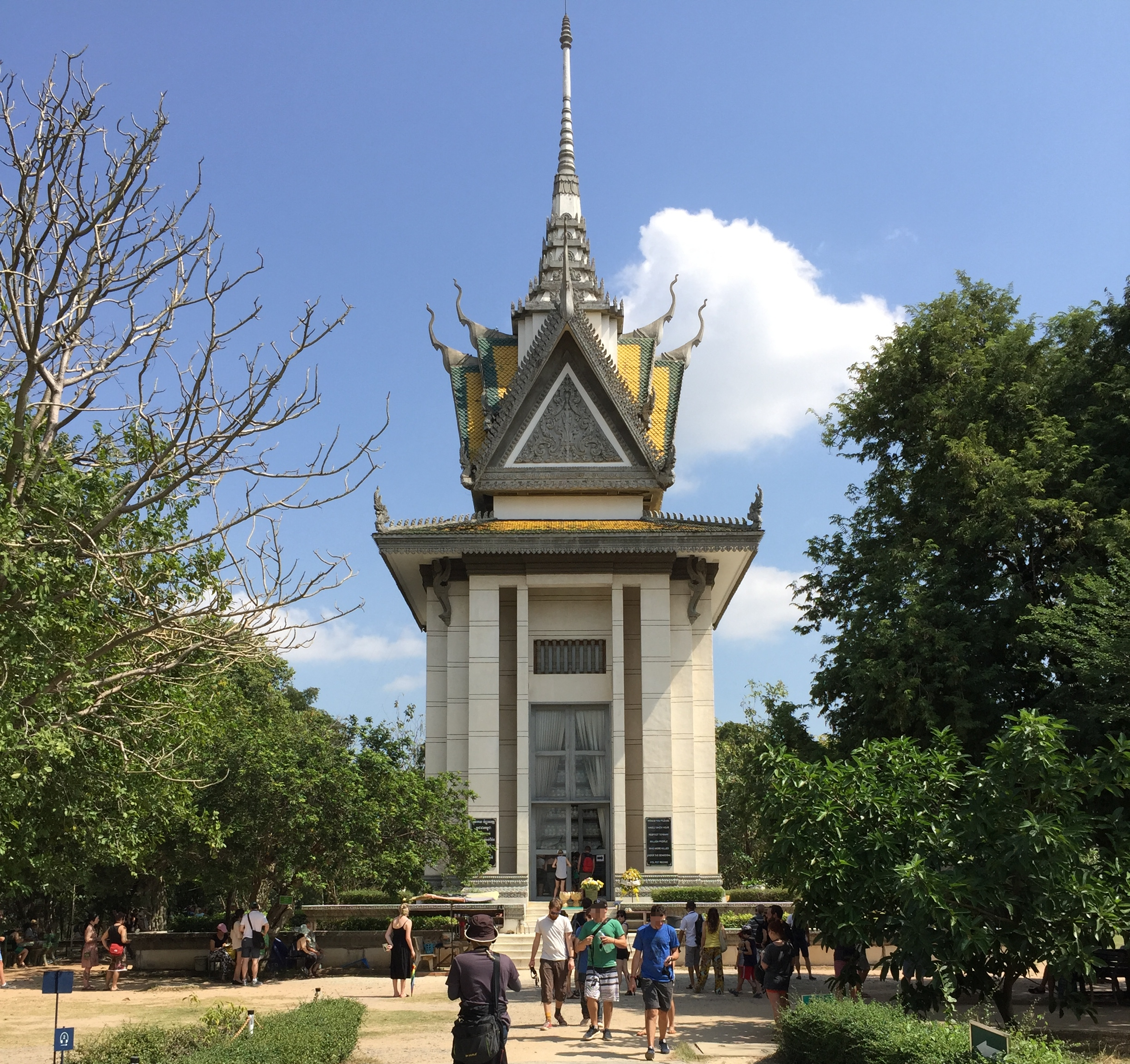 キリングフィールド慰霊塔